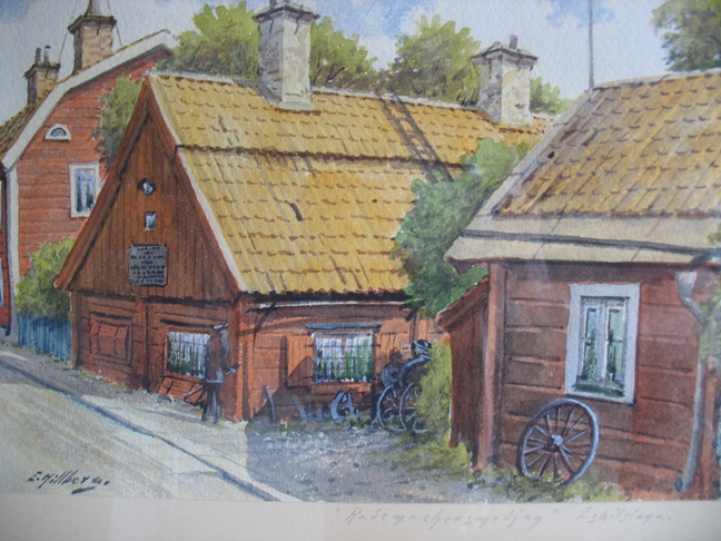 Akvarell av Einar Hillberg föreställande Rademachersmedjorna i Eskilstuna.